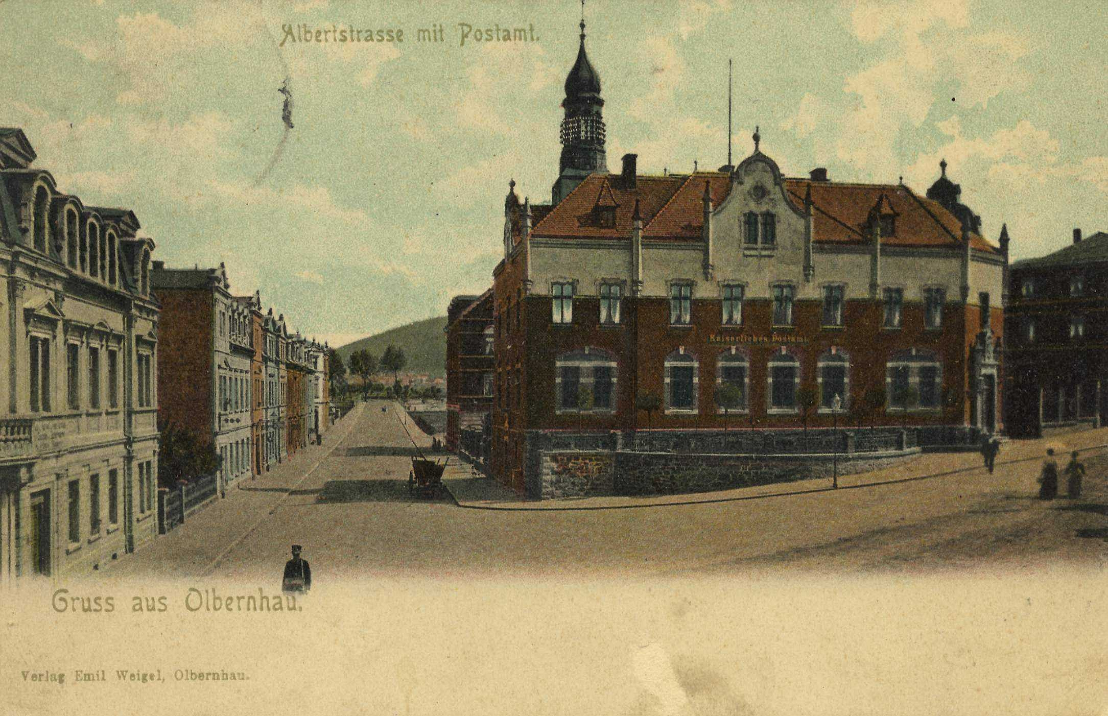 Die Albertstrasse und das Kaiserliche Postamt in Olbernhau im Erzgebirge in Deutschland.